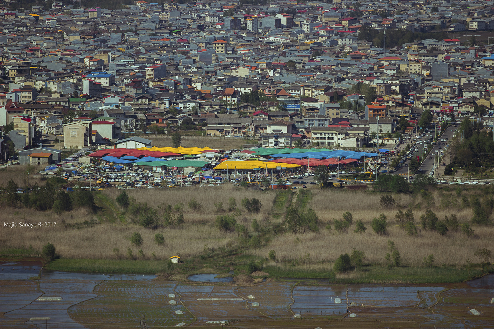 عکس از مجید صنایع پرکار